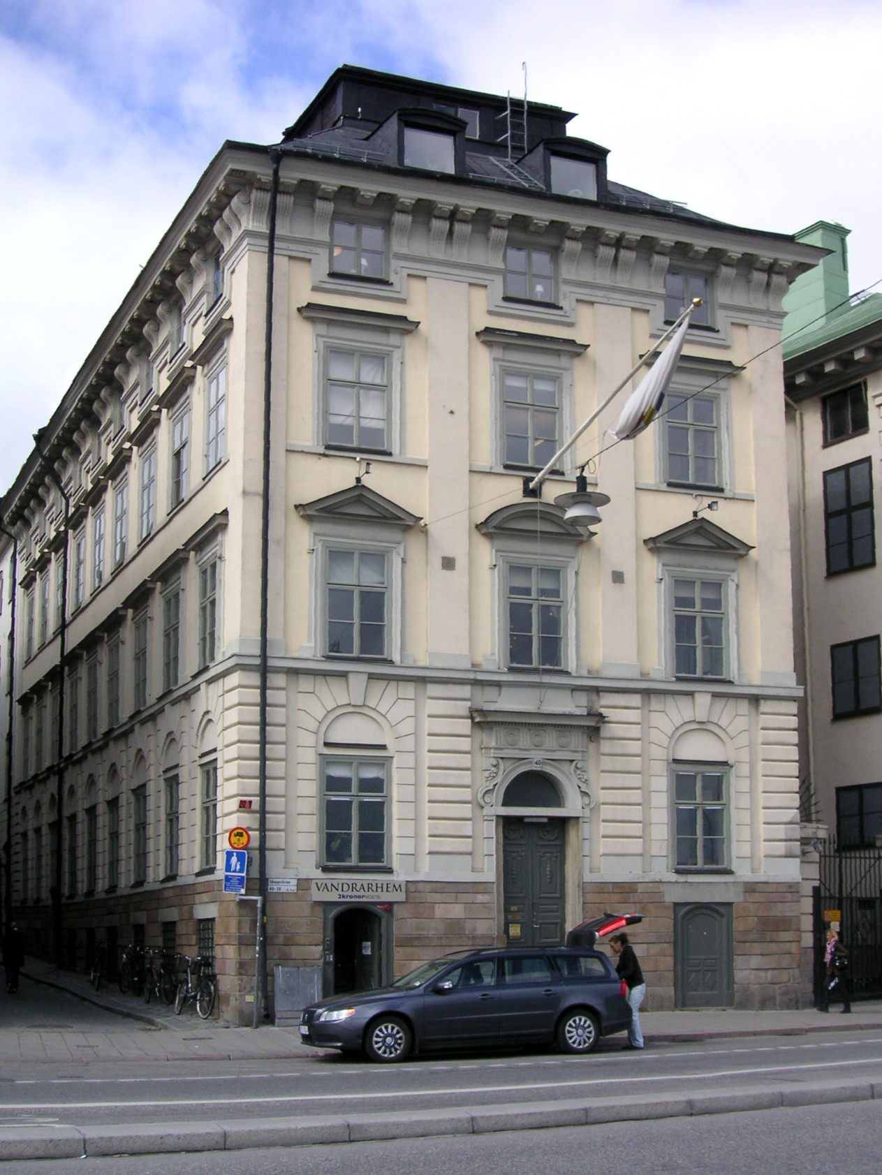 Byggnad "Skeppsbron nr 40" i Stockholm